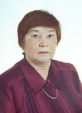 Тамара Ивановна Ерофеева